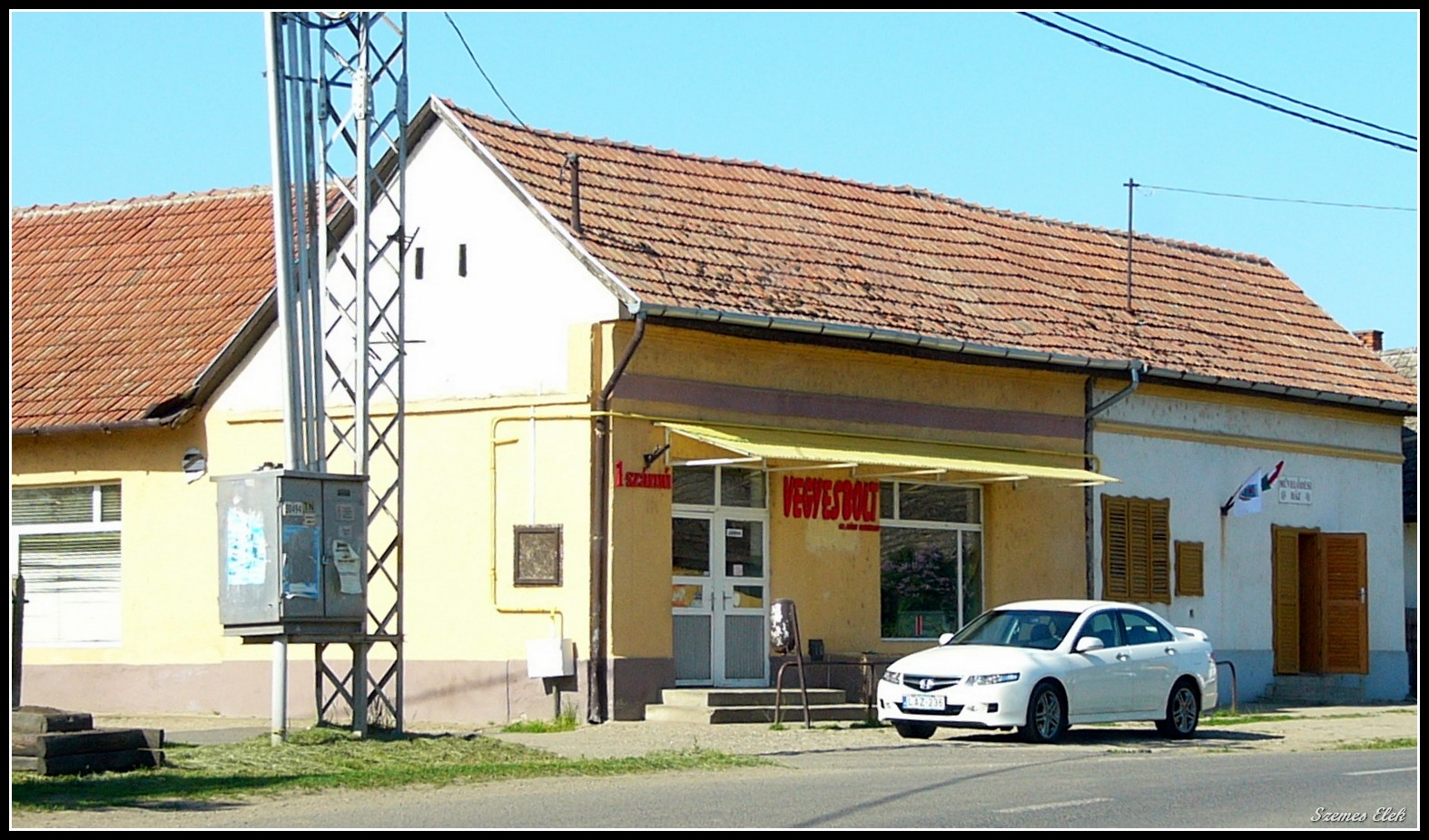 Kömörő, Hungary